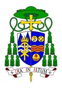 Vincent Long Van Nguyen COA